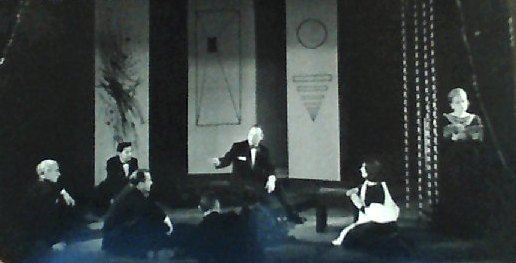 Išeivijos lietuvių aktorių darbas JAV